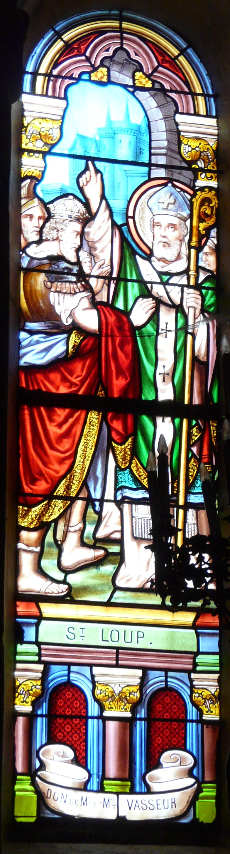 Vitrail représentant saint Loup de Limoges, chœur de l'église Saint-Germain-de-Paris, Saint-Germain-de-Belvès, Dordogne, France.